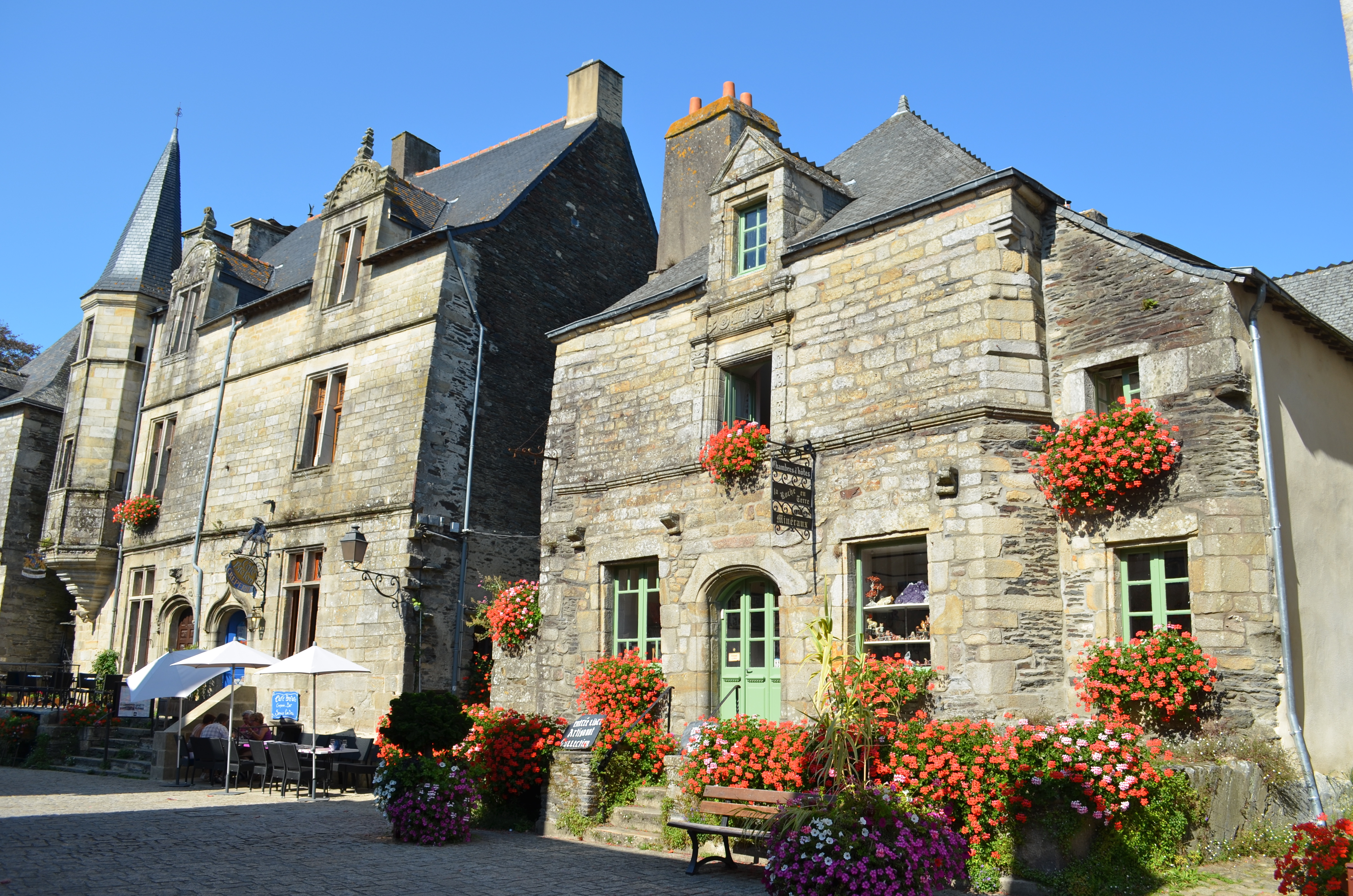 Gauche : Maison en granit, avec une tourelle en encorbellement Droite : Maison de 1666 - Rochefort-en-Terre (Morbihan) .